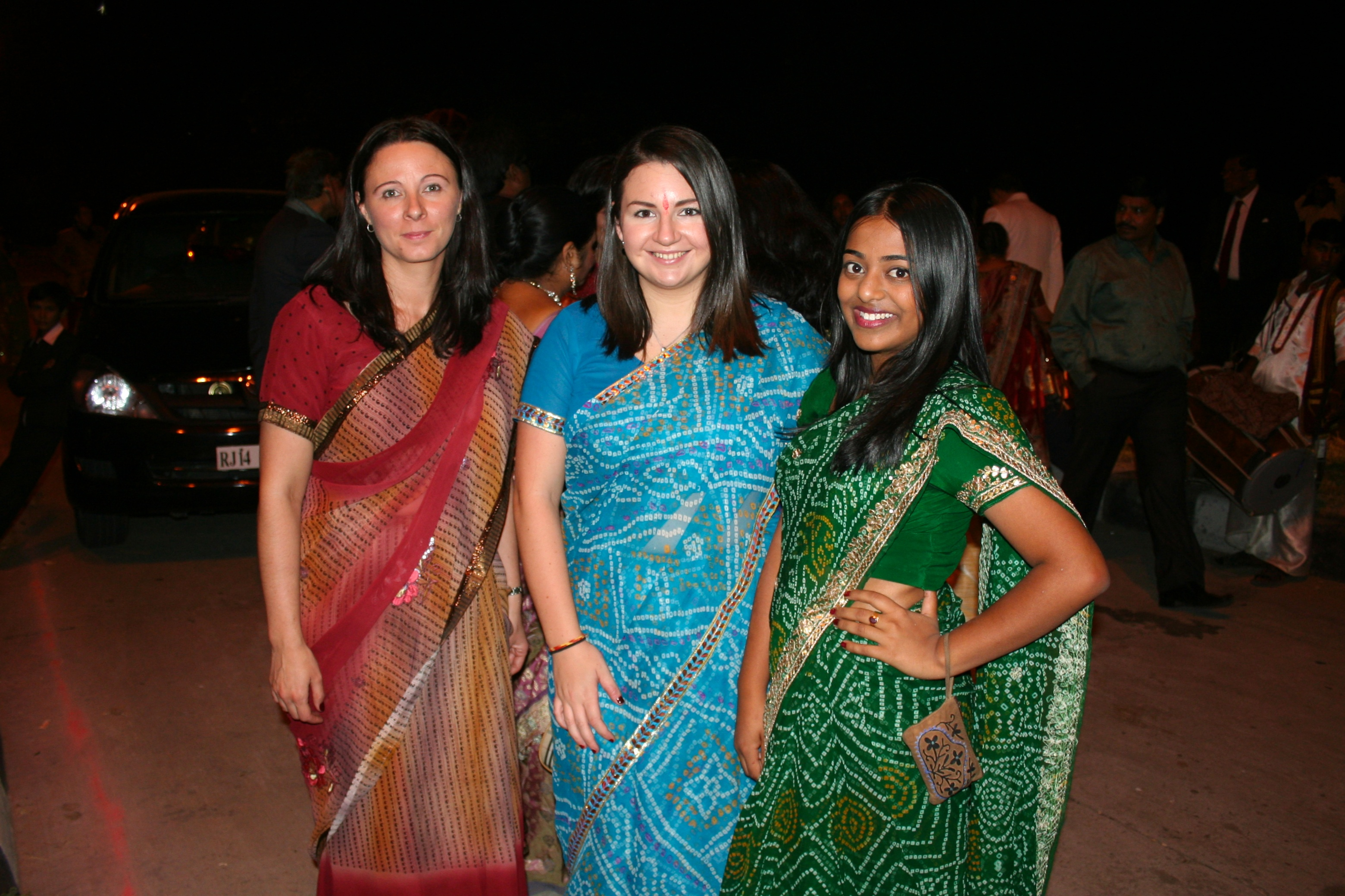 Saris